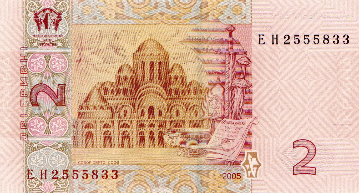 2 гривны 2005 г. выпуска, образца 2004 г. Реверс.